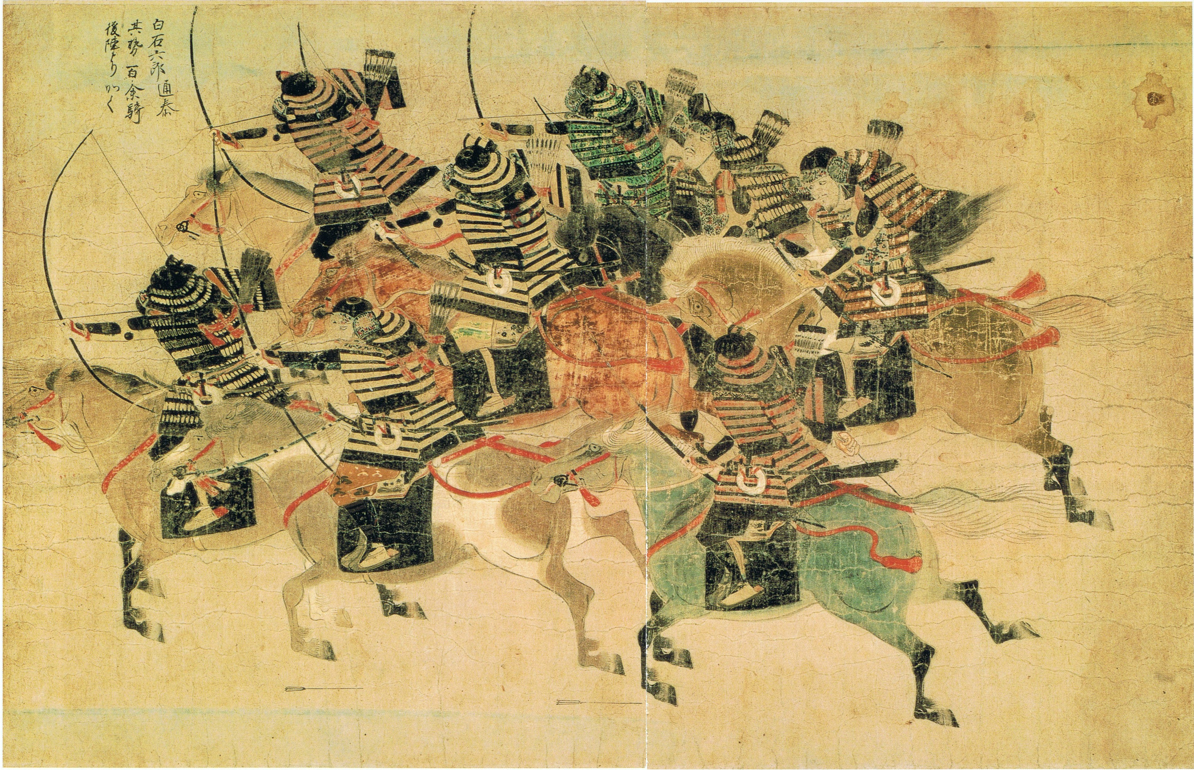 『蒙古襲来絵詞』前巻・絵5・第17紙 竹崎季長の後方より蒙古兵に突撃する白石通泰の手勢。 墨書に「白石六郎通泰/其勢百余騎/後陣よりかく」とある。